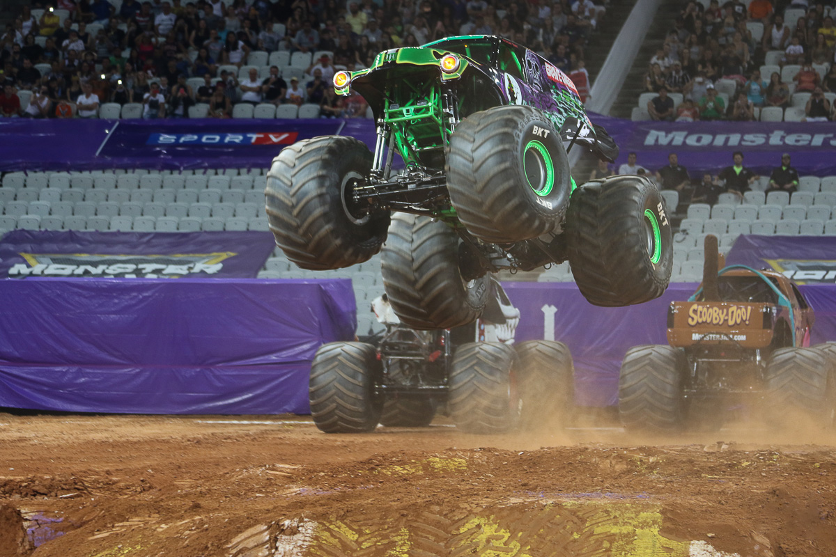 Monster Jam